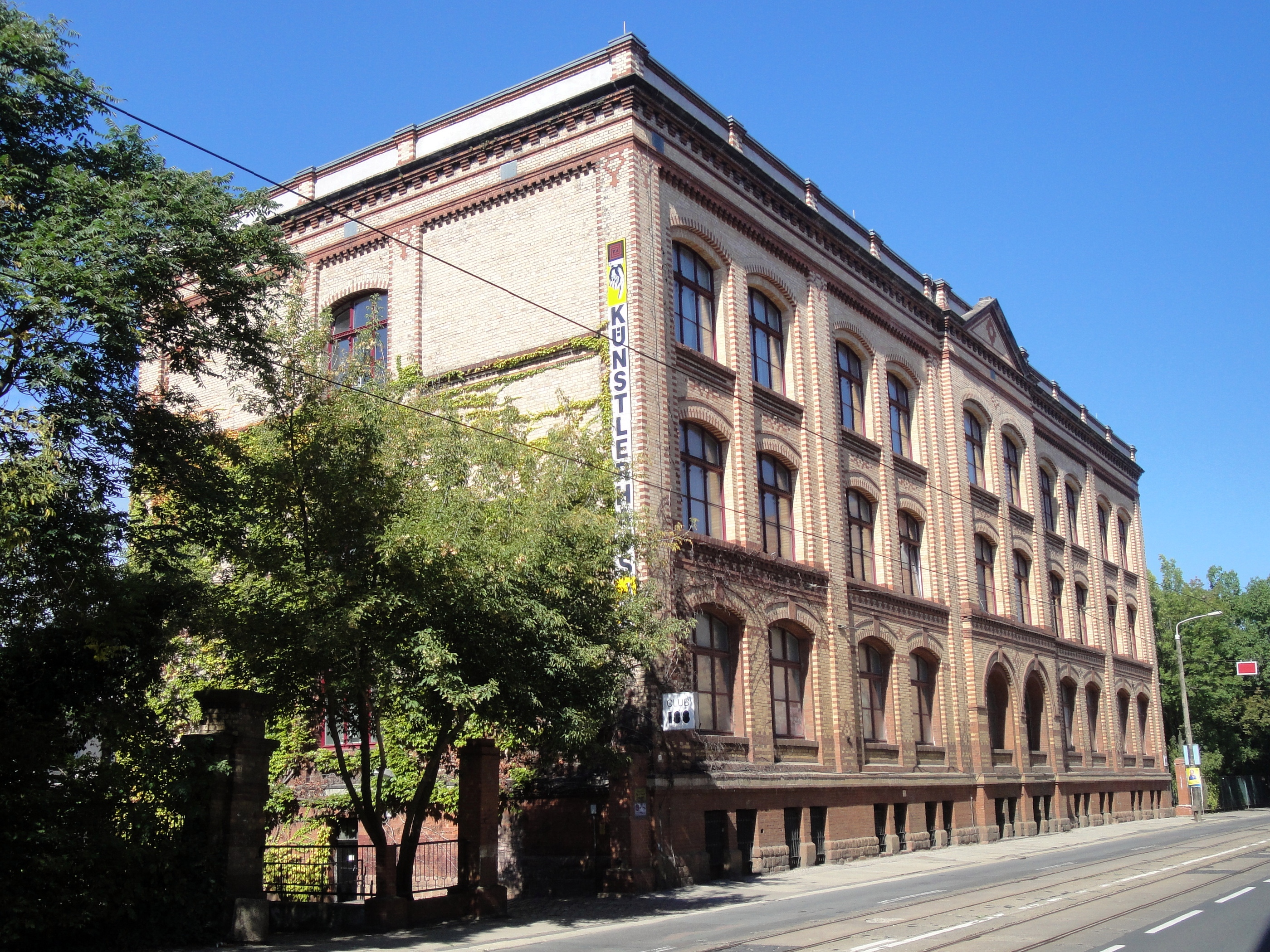 Künstlerhaus 188, ehemalige Weingärtenschule, Halle (Saale)